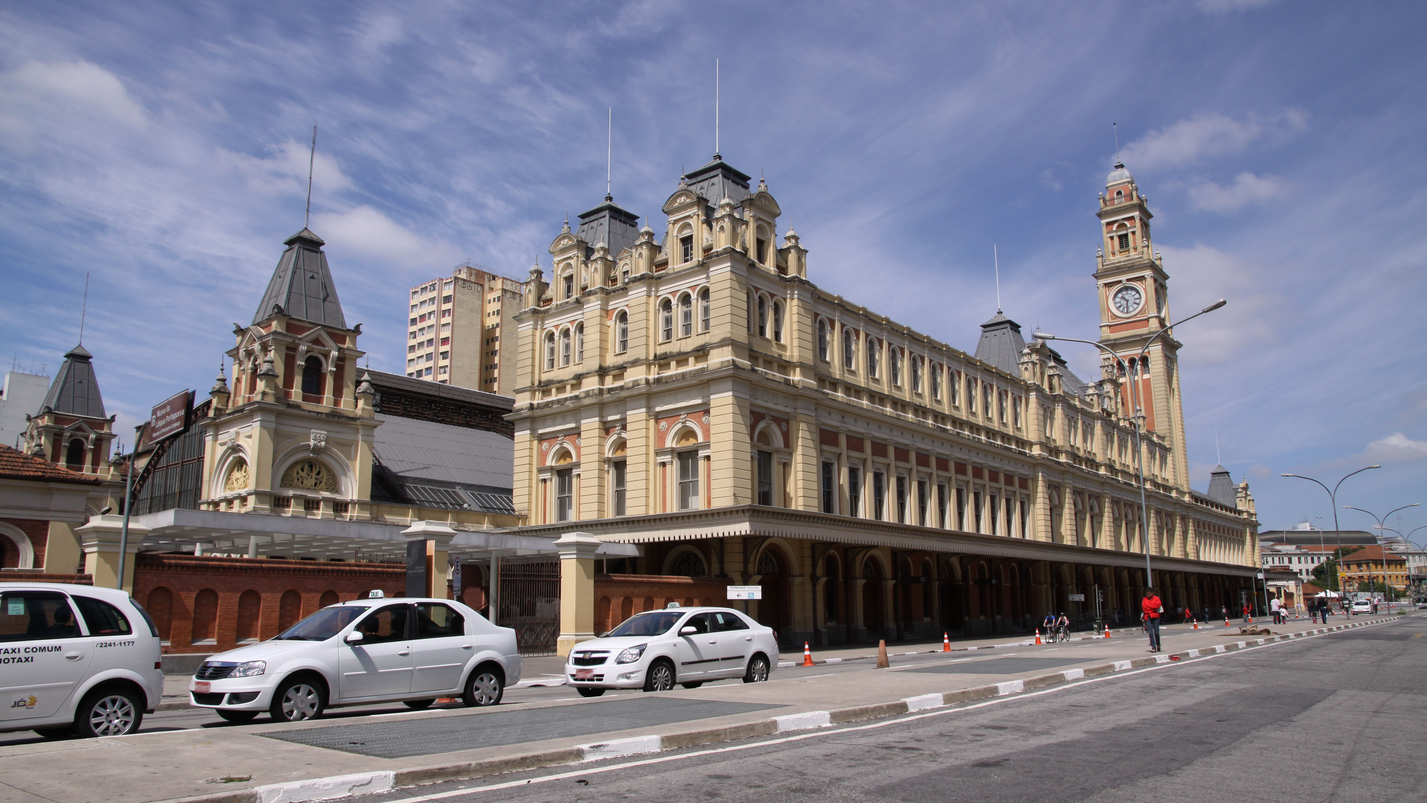 Estação de Trem na Praça da Luz em São Paulo, SP.